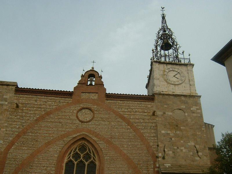 Cathédrale de Perpignan : partie supérieure de la façade occidentale